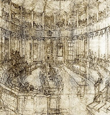 Hrvatski sabor 1861